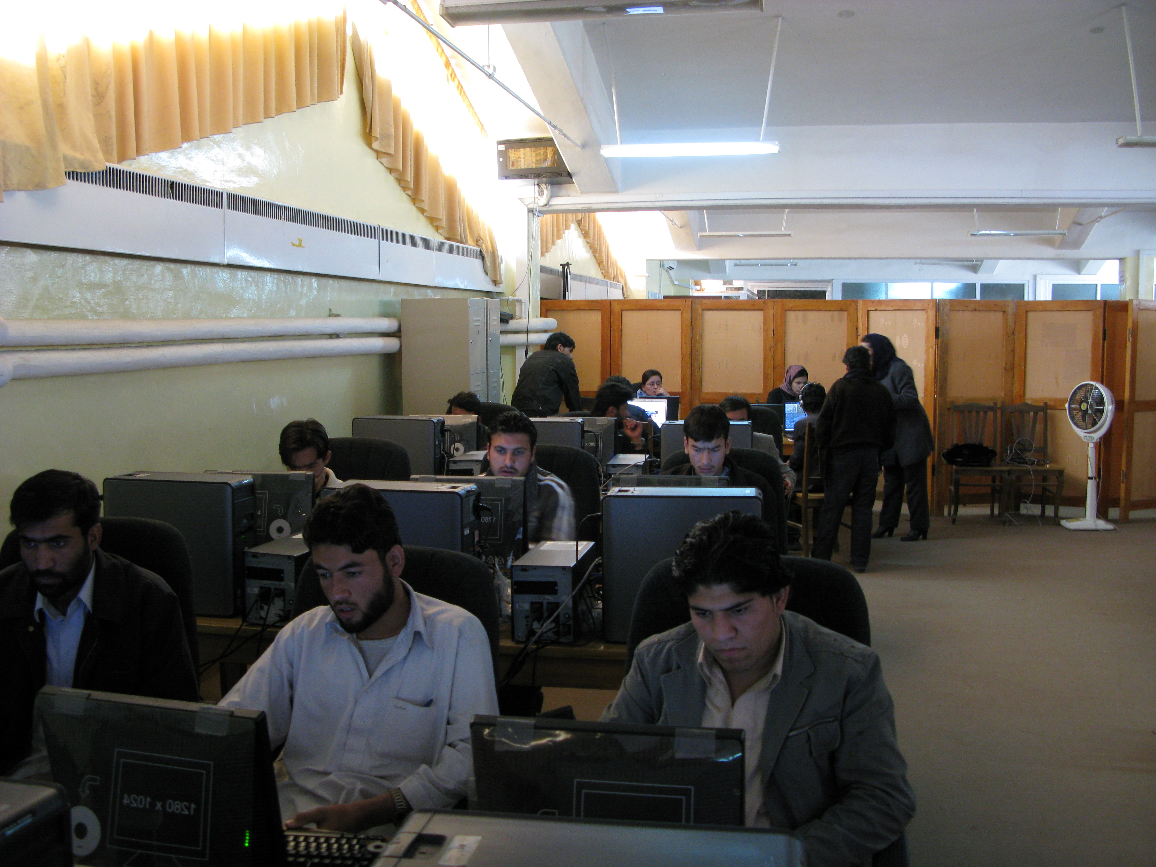 Angel Center at Kabul University in Kabul, Afghanistan.